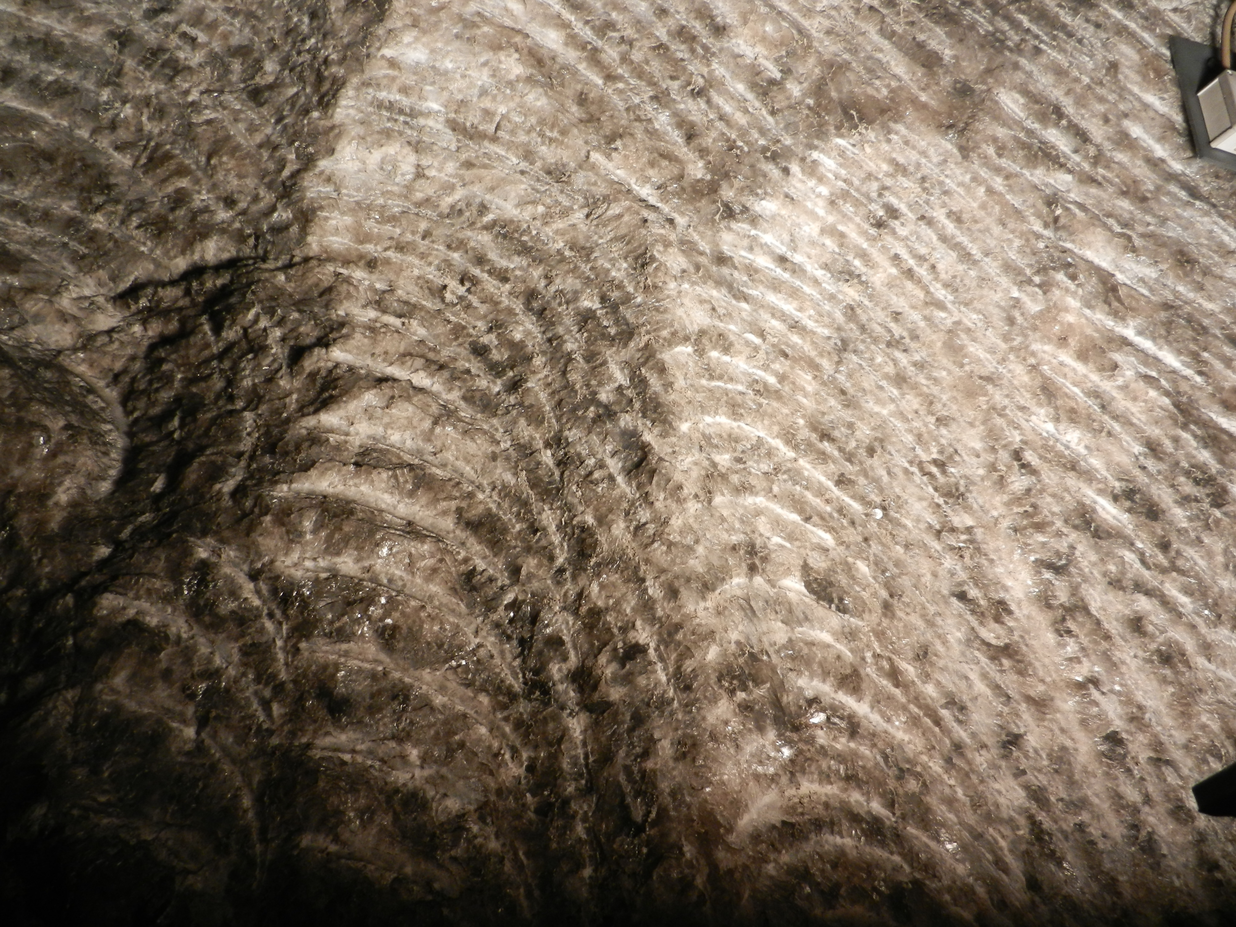 Salzbergwerk Stetten bei Haigerloch, Detail Salzwand